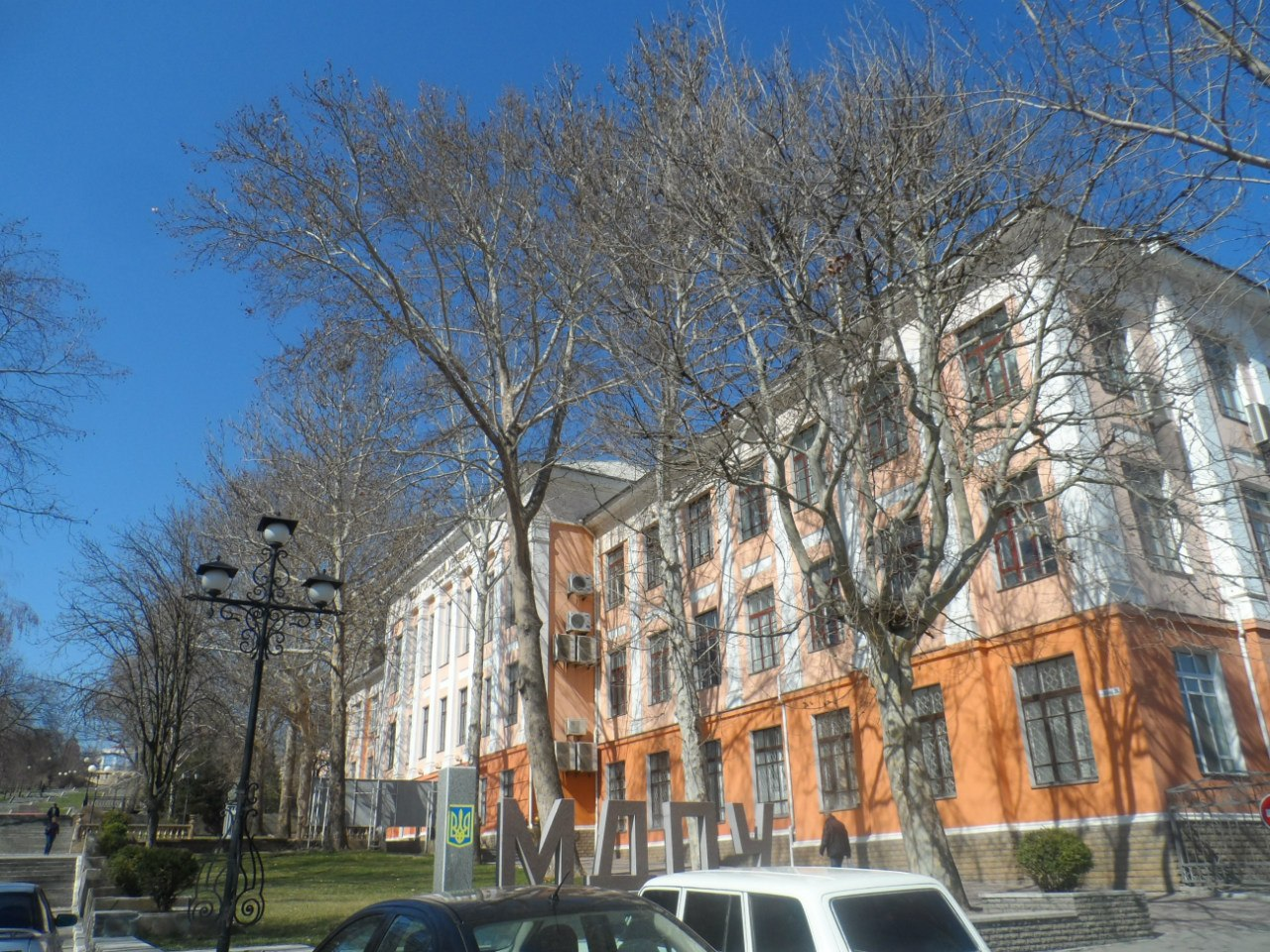 Педагогический университет